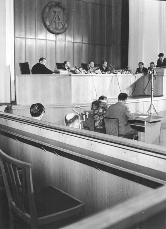 Oberstes Gericht, Globke-Prozess, Richterbank Zentralbild Brüggmann Stöhr-8.7.1963 Globke-Prozess eröffnet. Vor dem 1. Strafsenat des Obersten Gerichts der DDR begann am 8. Juli 1963 der von der internationalen Öffentlichkeit mit großer Spannung erwartete Prozess gegen den langjährigen leitenden Mitarbeiter des faschistischen Reichsinnenministerium und derzeitigen Bonner Staatssekretär Dr. Hans Globke. UBz: Generalstaatsanwalt Josef Streit (rechts) beim Verlesen der Anklageschrift. Vorne der leere Stuhl des Angeklagten.